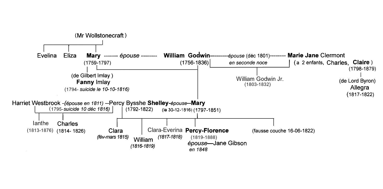 Arbre généalogique de Mary Godwin-Shelley, à partir des éléments fournis par l'article Mary Shelley et d'éléments présents sur l'arbre en anglais.